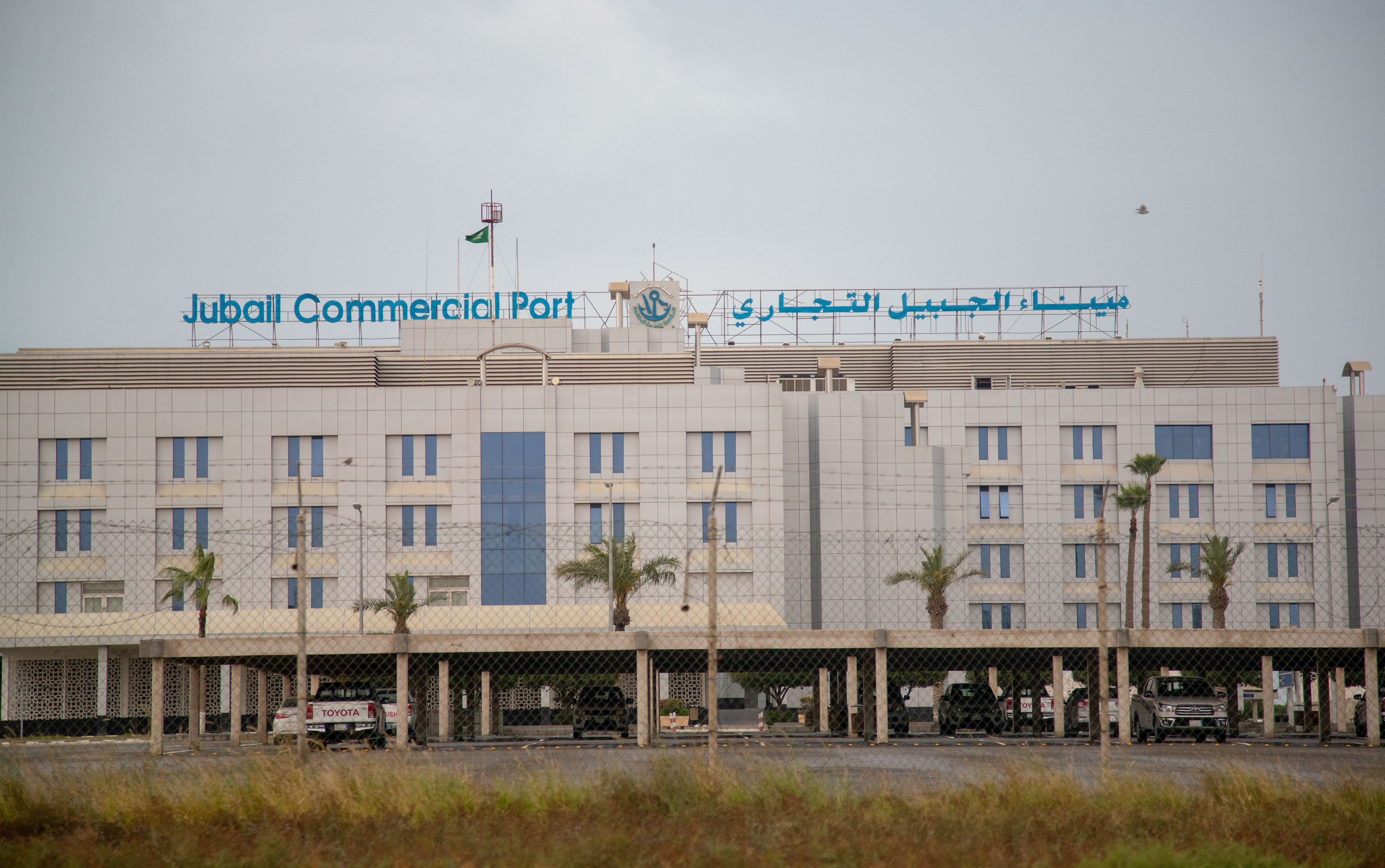 ميناء الجبيل التجاري